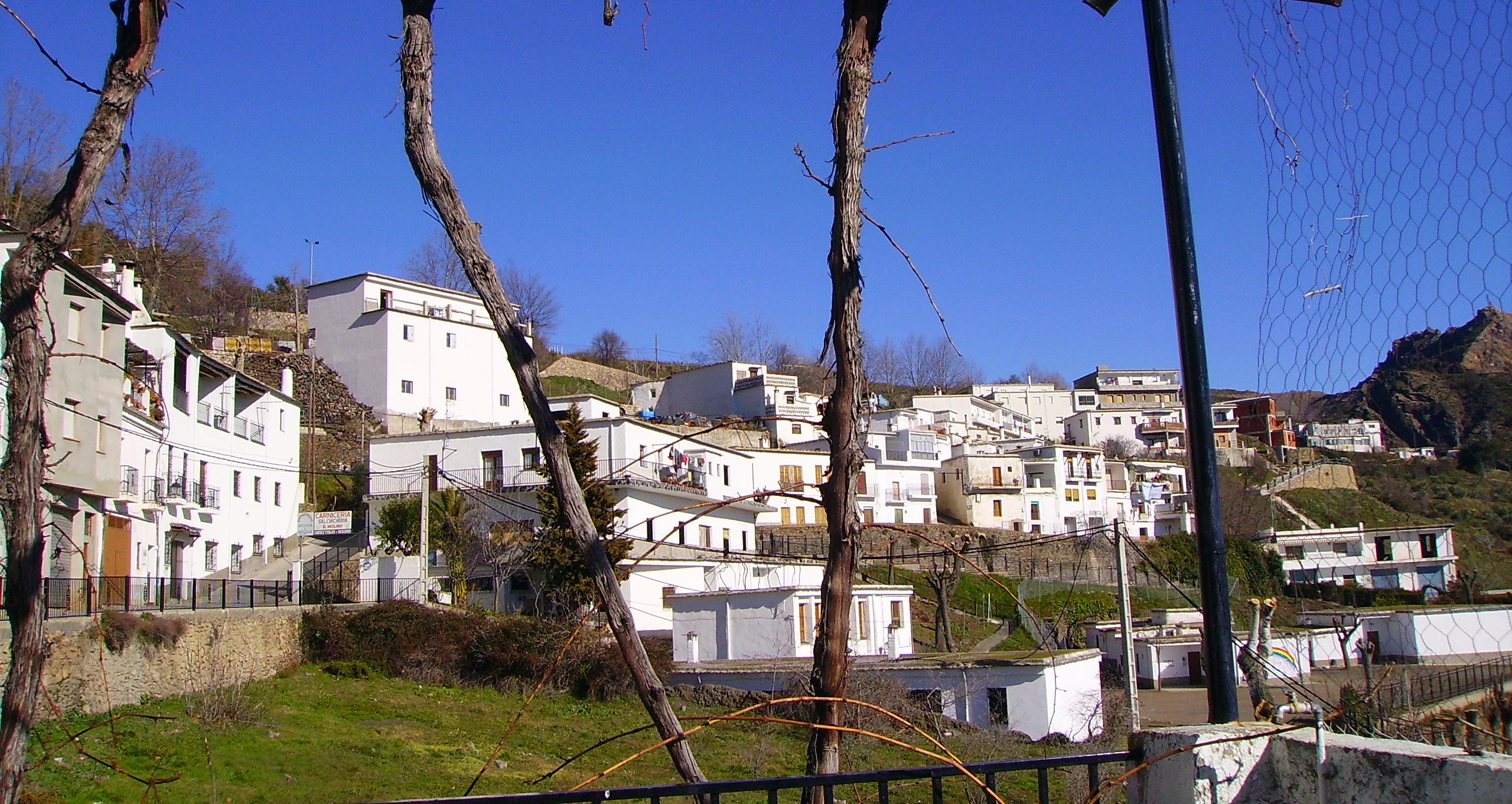 Busquístar